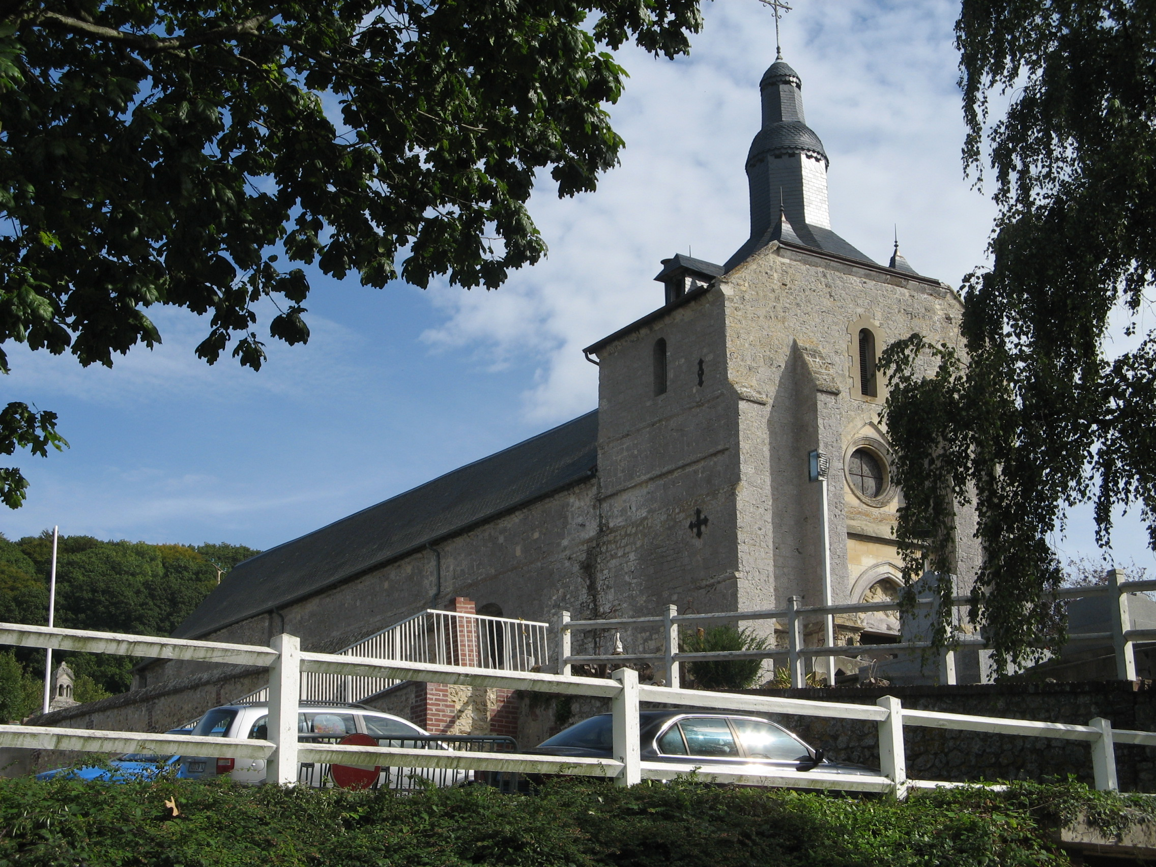 église de Pennedepie, Calvados, France.